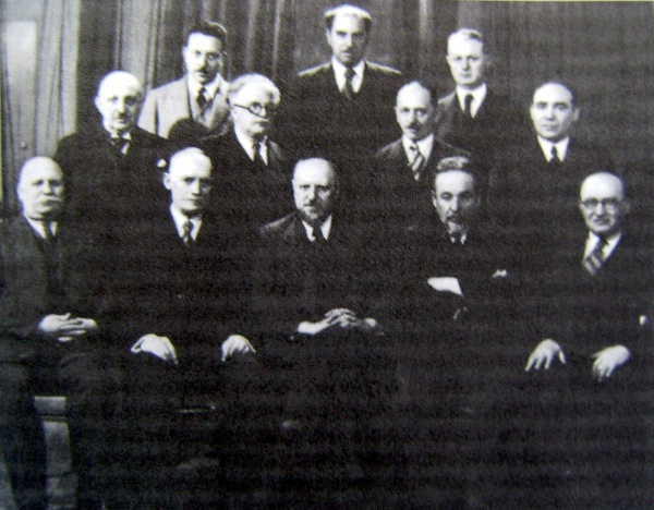 Настоятелството на Българското икономическо дружество на 40-годишния му юбилей